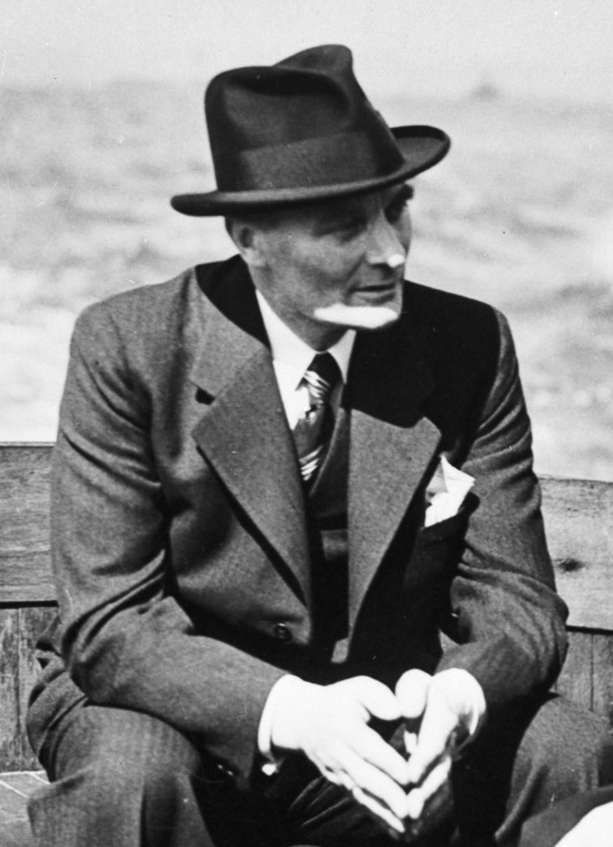 De minister van Defensie, kolonel A.Q.H. Dijxhoorn bezocht een marine opleidingsschool waar Nederlandse marine-officieren worden getraind en inspecteerde daarna Nederlandse marine-eenheden in een Britse haven. In gesprek met een marine-officier